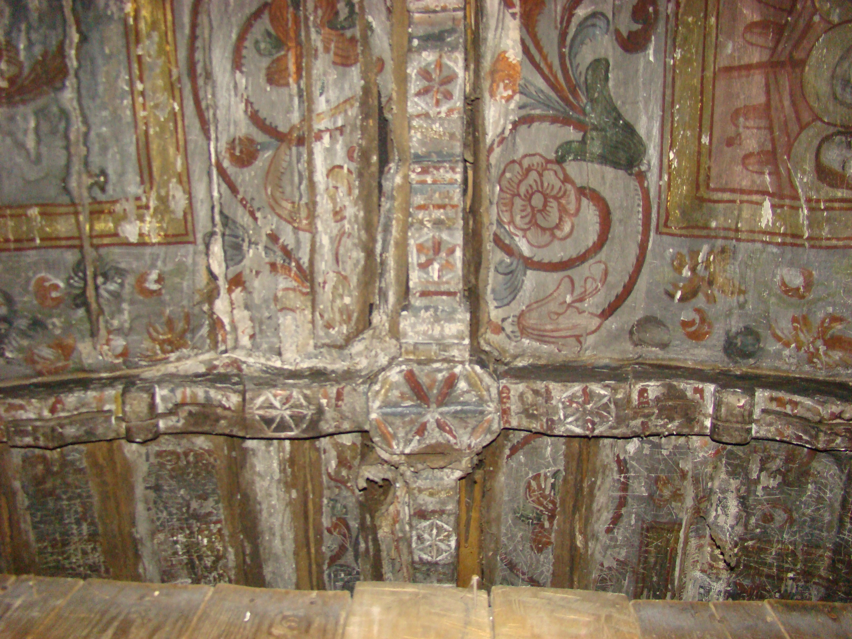 Biserica Sfinţii Arhangheli, Sat Brusturi, Comuna Creaca, județul Sălaj